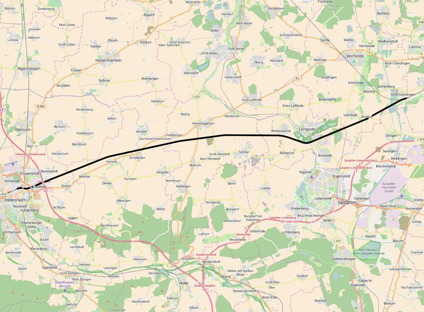 DB 1772, Hildesheim - Groß Gleidingen